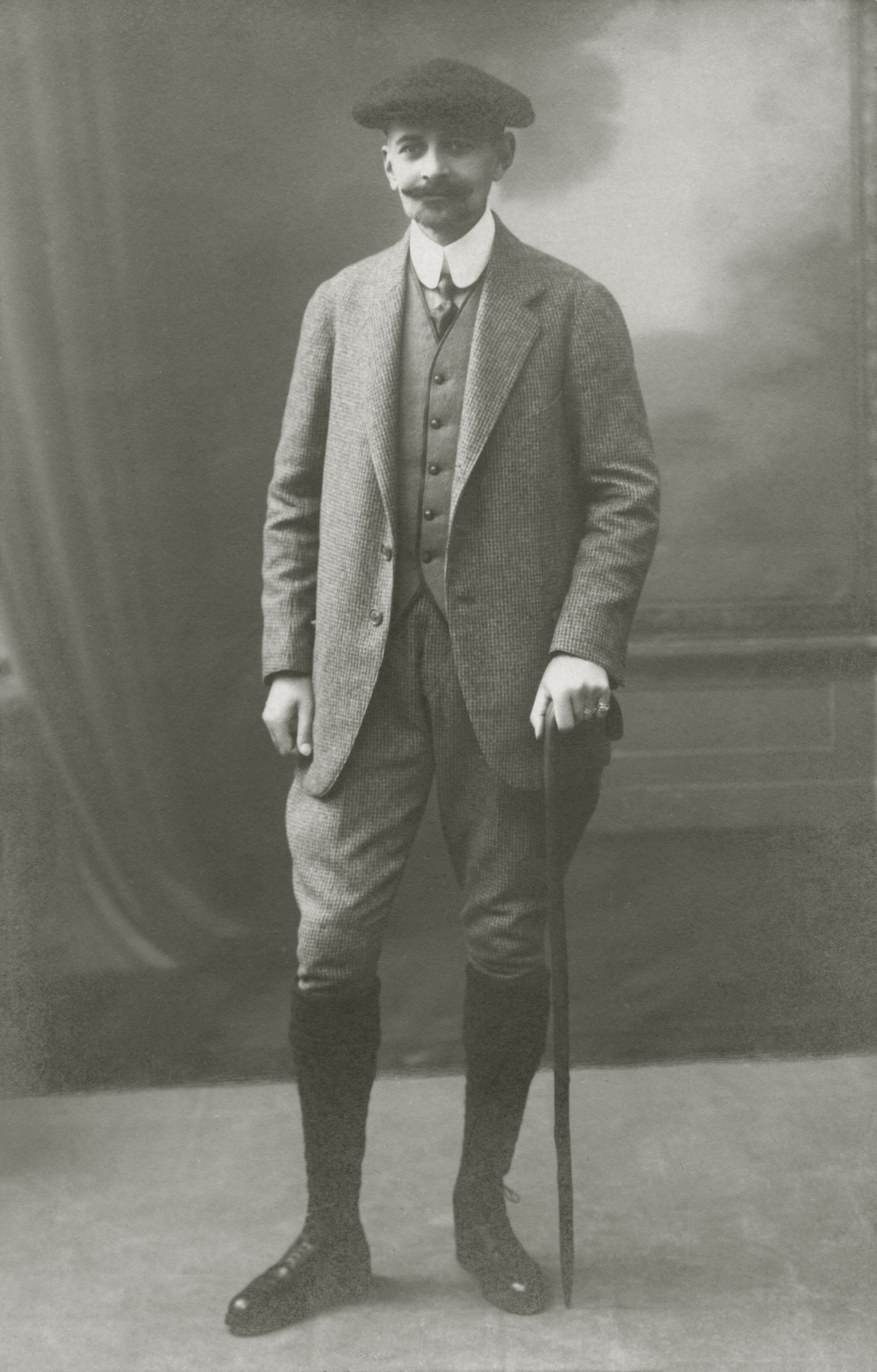 Kazimierz Innocenty Ostaszewski (1864-1948), syn Teofila Wojciecha Ostaszewskiego (1807-1889) i Emmy z Załuskich (1831-1912)